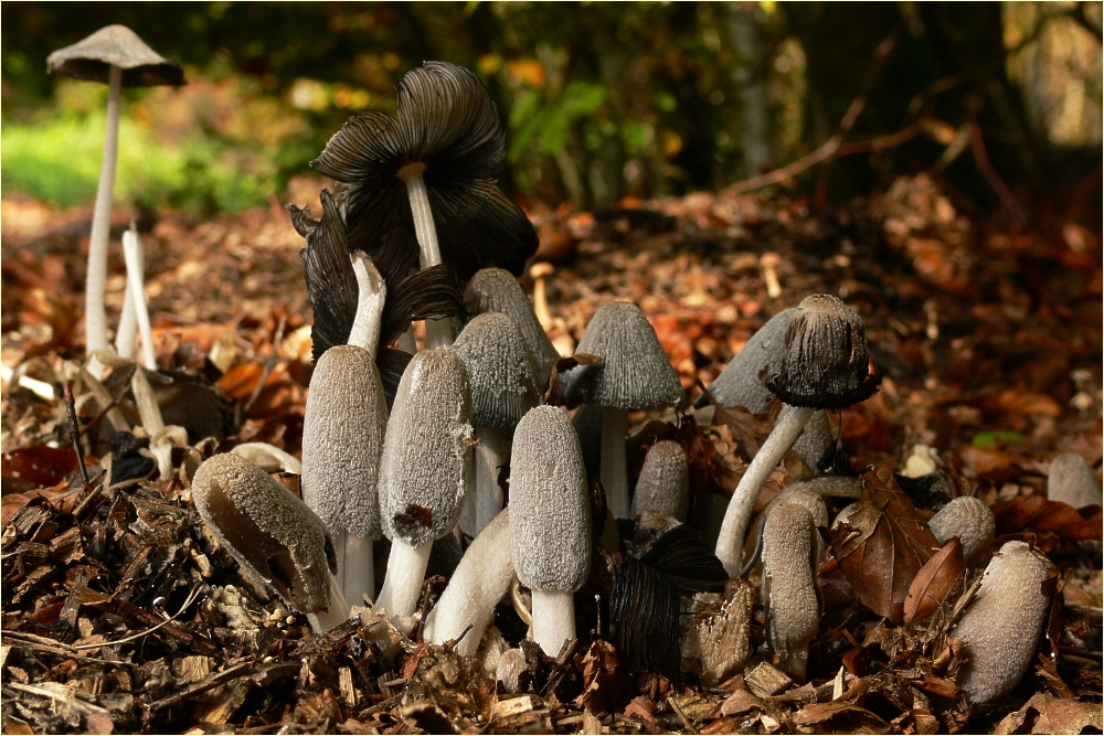 Hasenpfote (Coprinus lagopus) im Reinhardswald